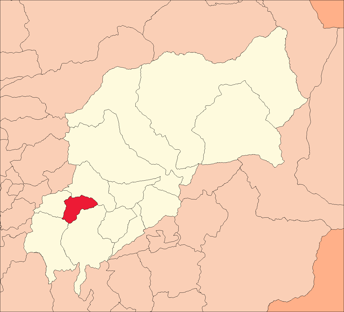 Área del distrito de Yarumayo.